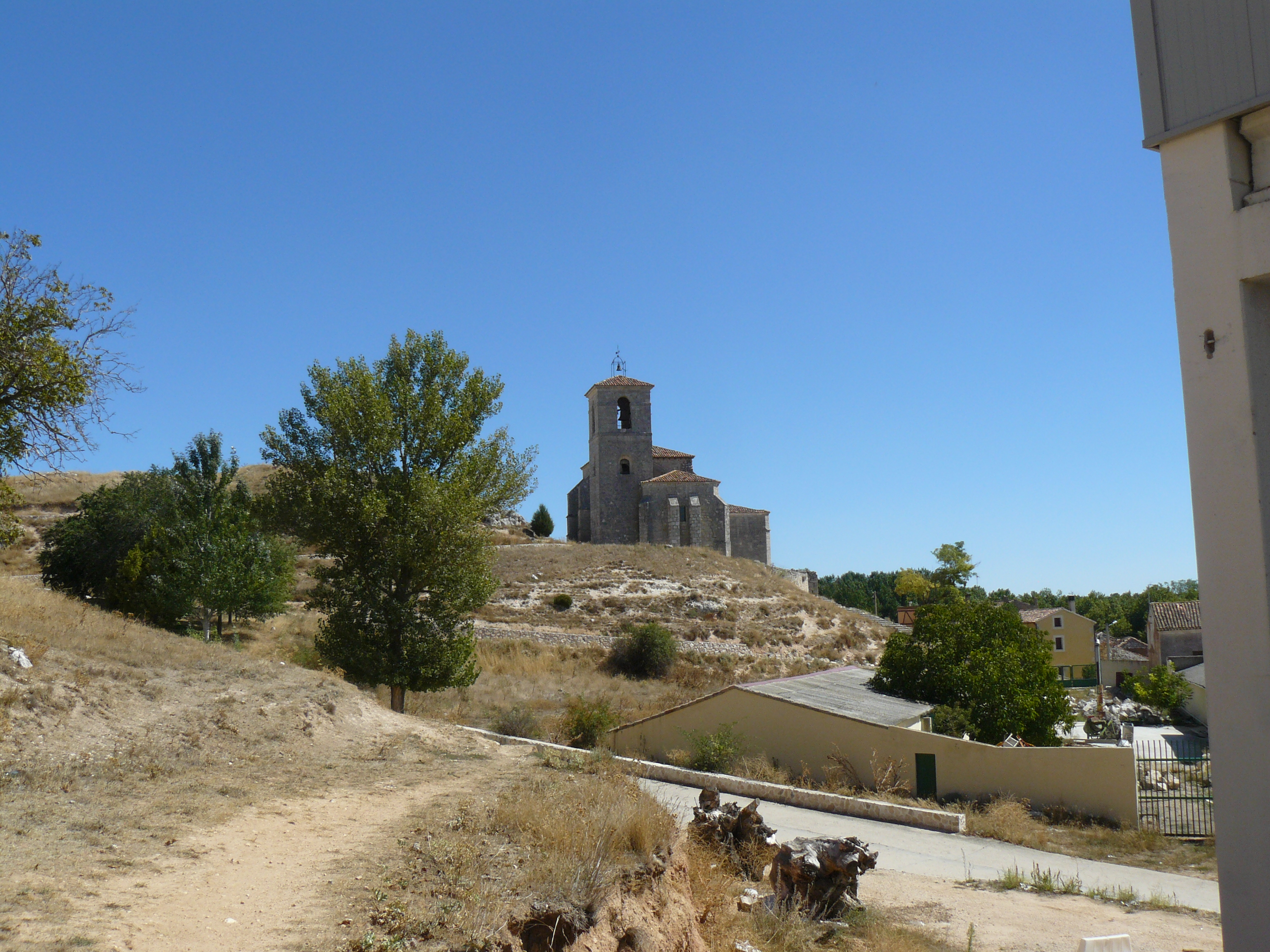 Cabañes de Esgueva, Burgos.